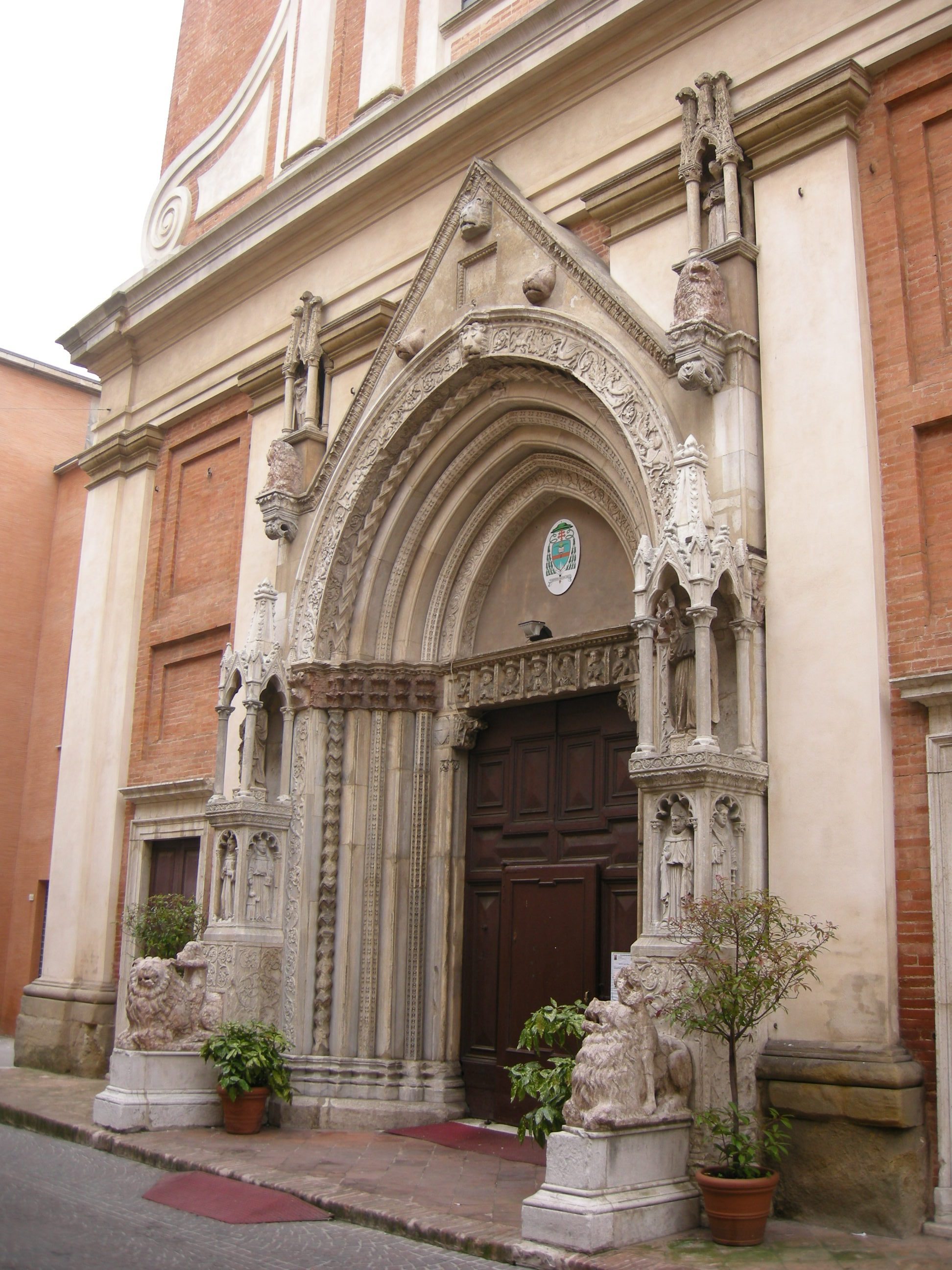 Pesaro, sant'agostino